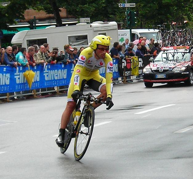 Iban Mayo en la 20ª etapa del Giro de Italia 2007 (Bardolino - Verona, 43 km CRI)